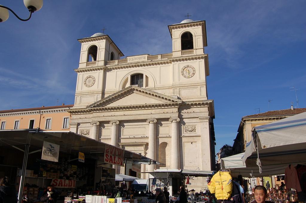 L'Aquila, Italia